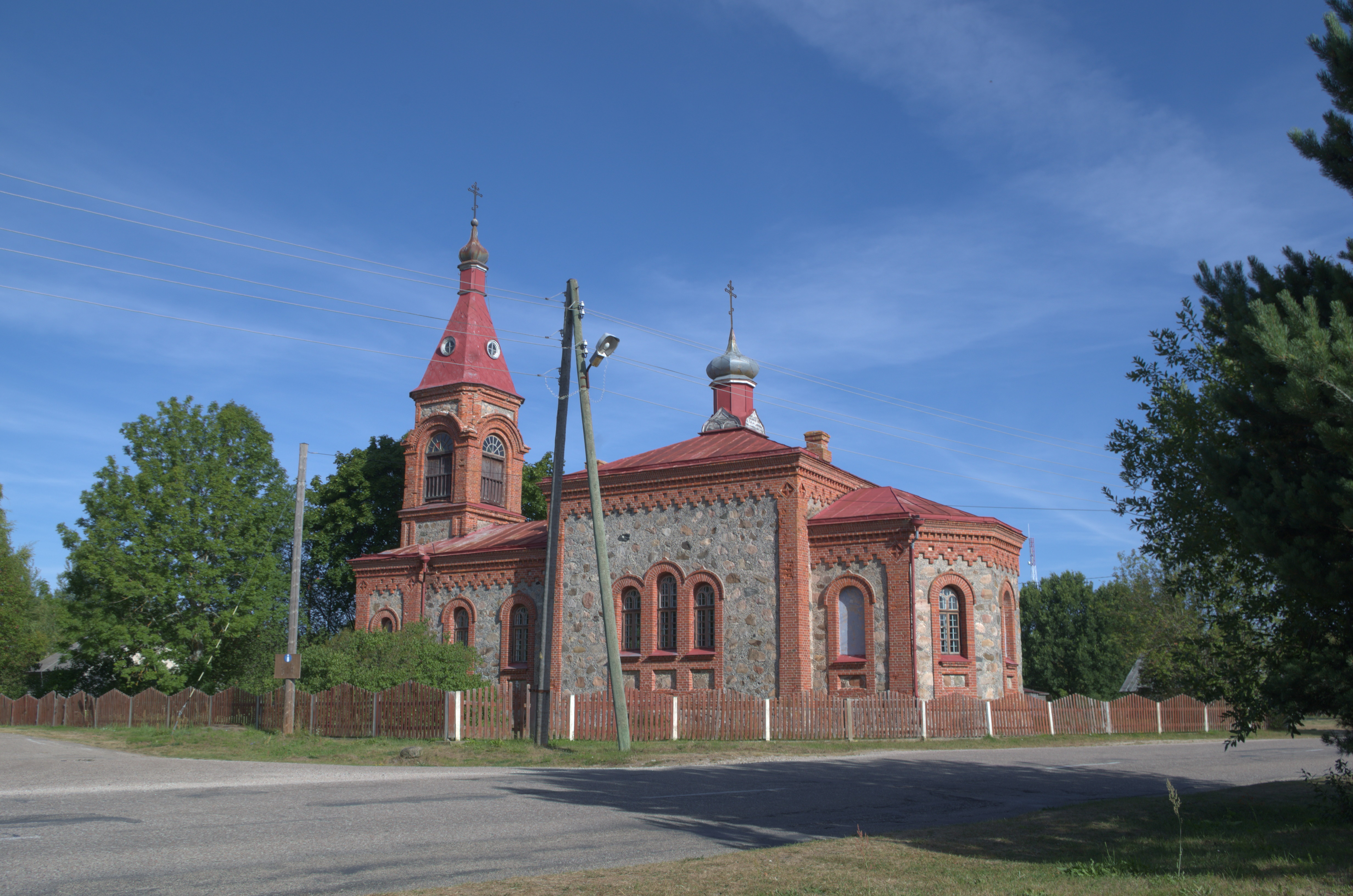 Kolka õigeusu kirik